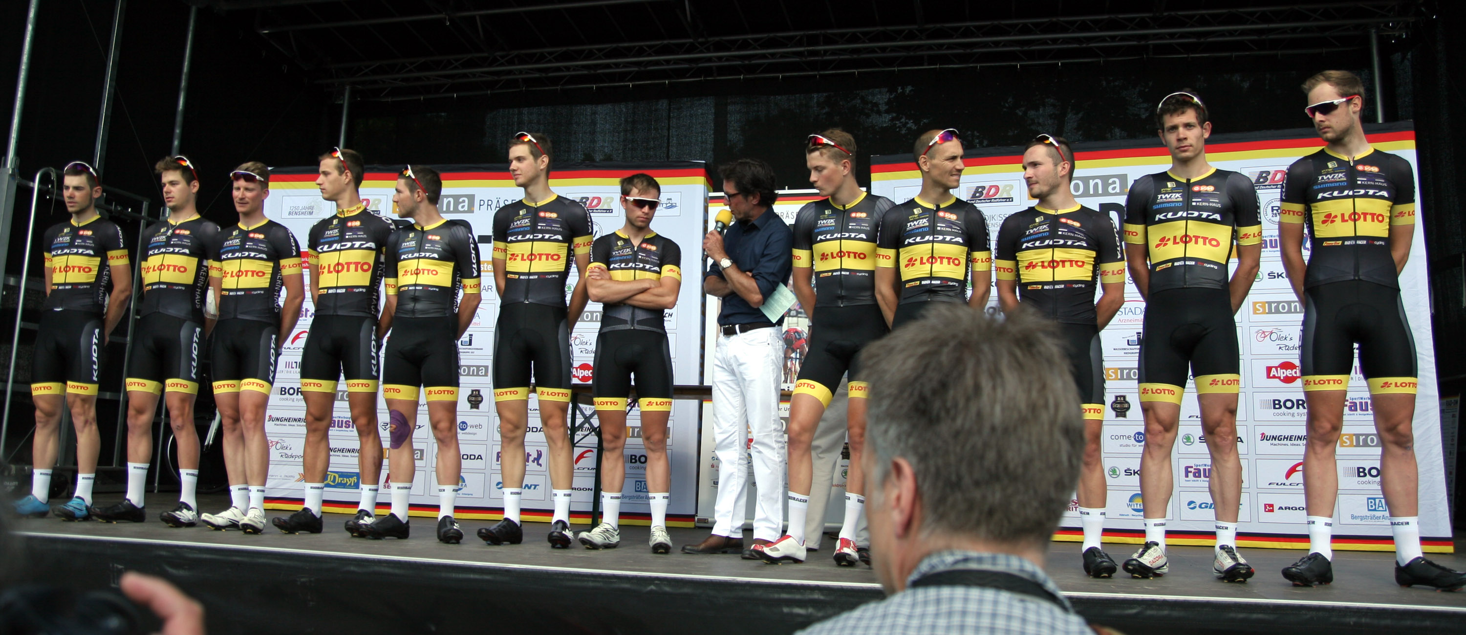 Team Kuota-Lotto bei der Vorstellung vor dem Rennen. Foto von den Deutschen Meisterschaften im Straßenrennen der Männer (Elite) am 28. Juni 2015 in Bensheim (Hessen)